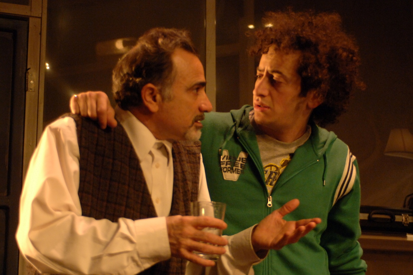 גן הדובדבנים, תיאטרון גשר